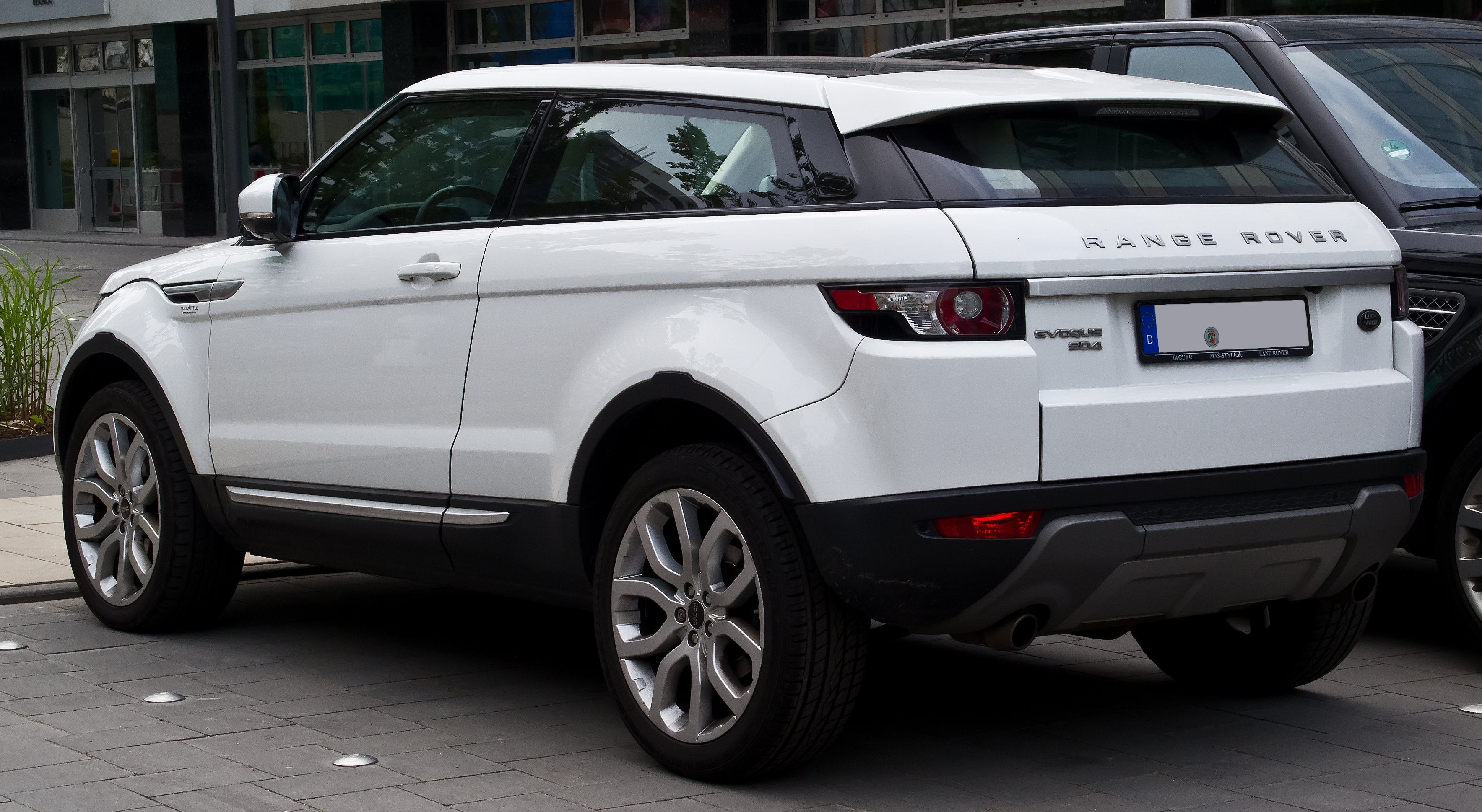 Range Rover Evoque Coupé SD4 4WD Prestige